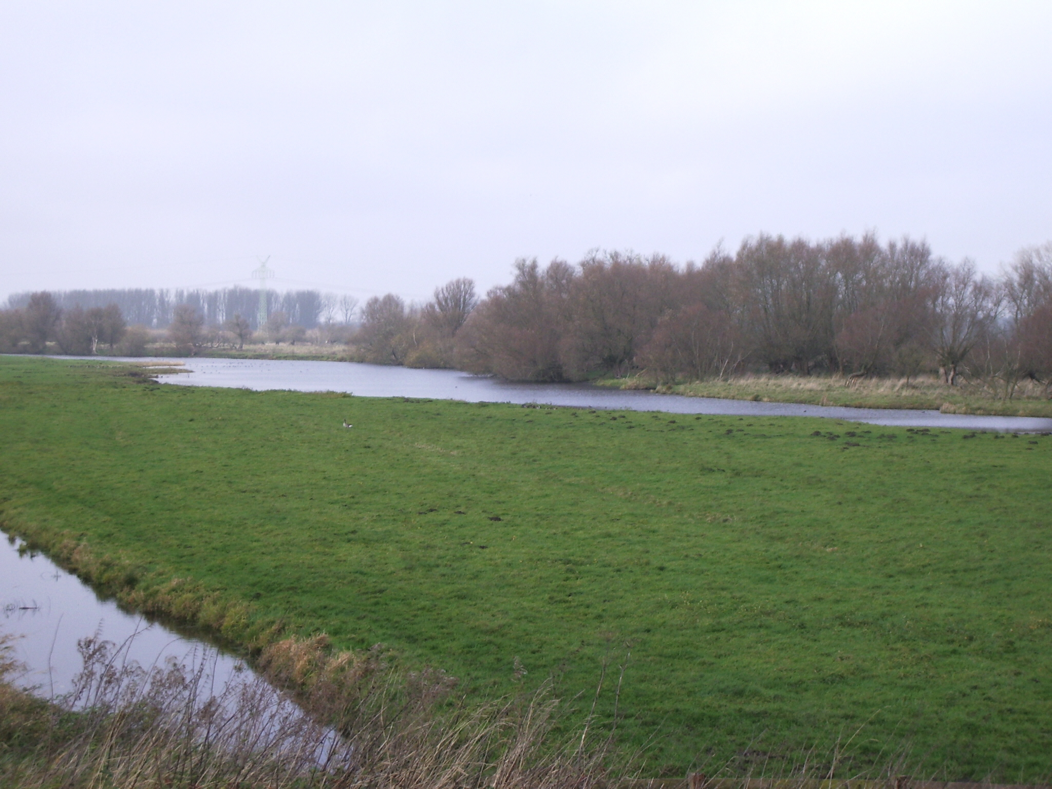 Haseldorfer Binnenelbe im Herbst bei Hetlingen im Kreis Pinneberg